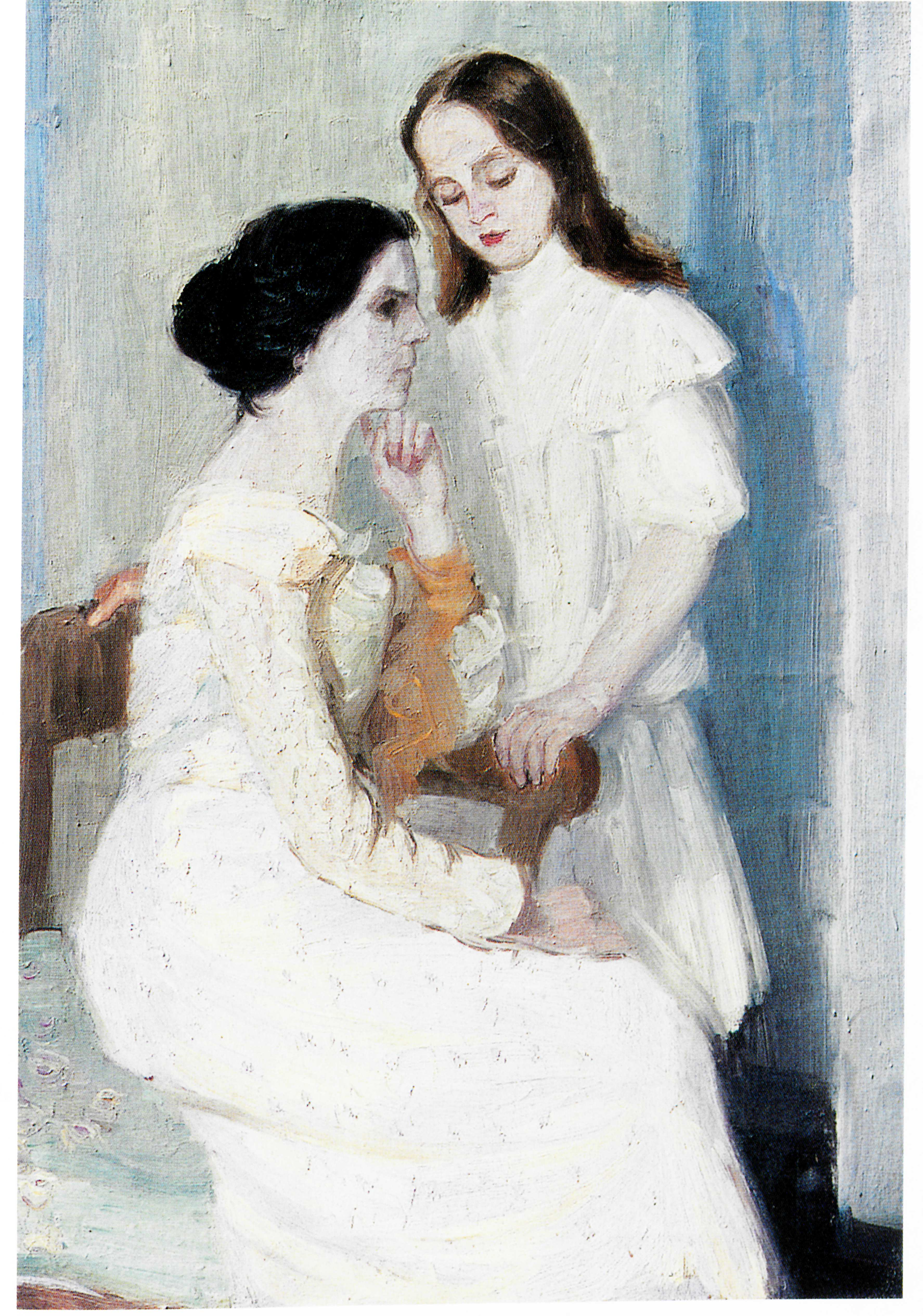 Johanna Oppenheimers Schwester Cäcilie mit ihrer Tochter Edith